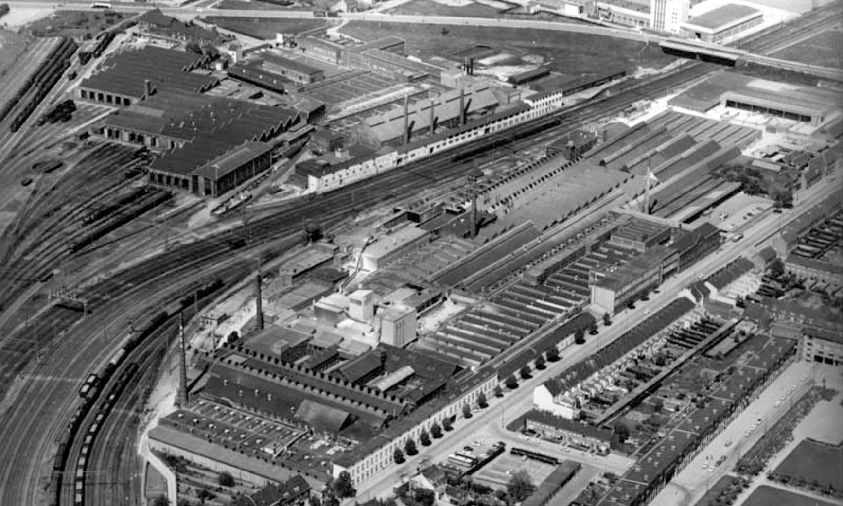 Luchtopname van fabriekscomplexen in het noordoosten van Maastricht in 1966. Rechts van de spoorlijn de porselein- en tegelfabriek Mosa. Links van de spoorlijn de NS-werkplaats en de glasfabriek Kristalunie (destijds Vereenigde Glasfabrieken). Fotocollectie RHCL Maastricht, GAM 6629.